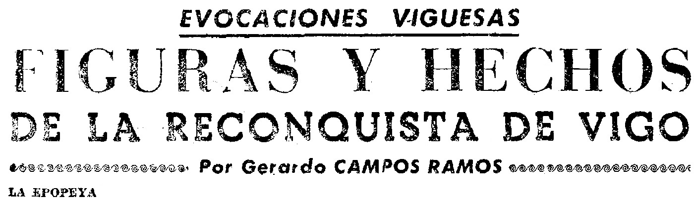 Anuario de Vigo: "Evocaciones viguesas. Figuras y hechos de la Reconquista de Vigo" por Gerardo Campos Ramos.